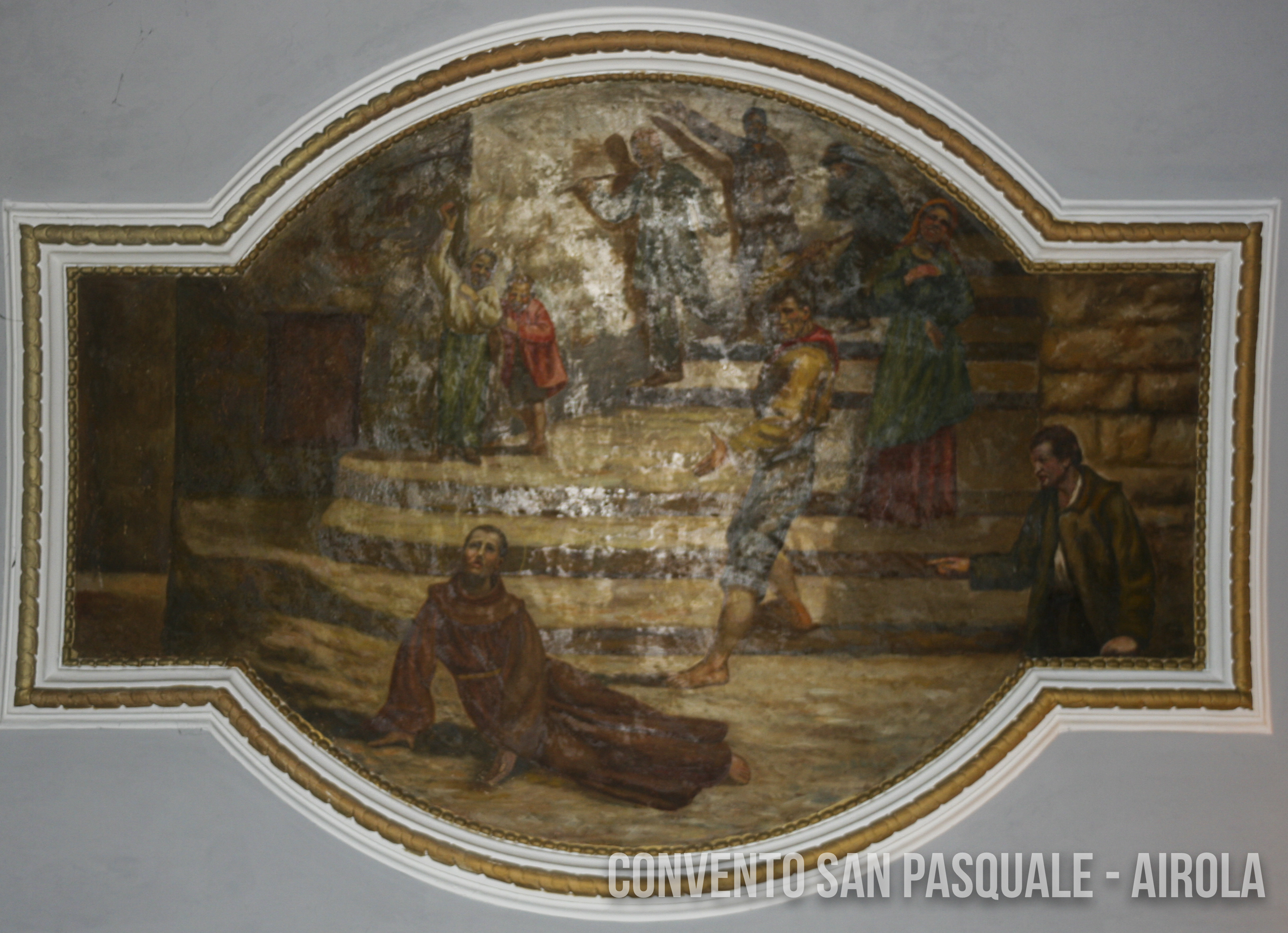 Chiesa SS. Concezione - Airola (BN)